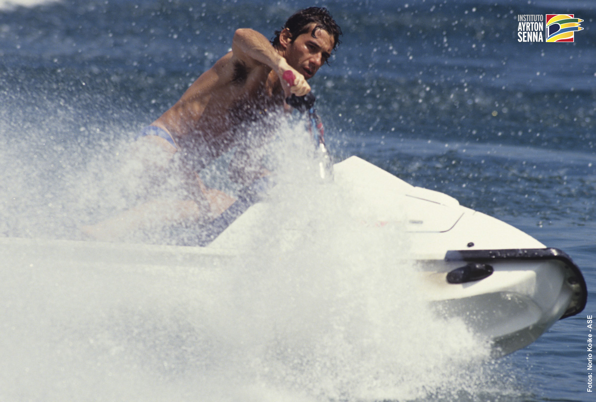 Ayrton Senna jet skiing